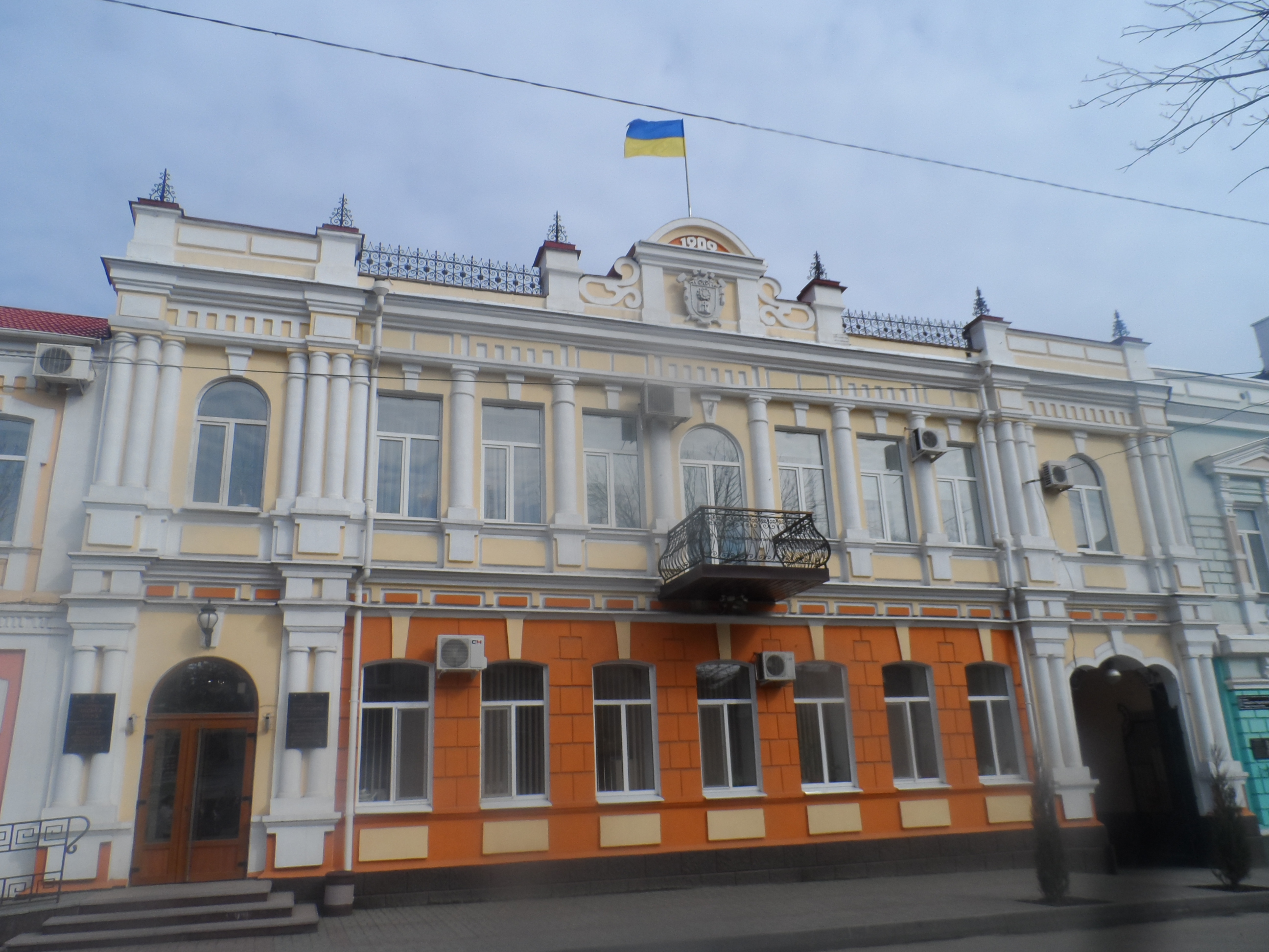 Мелитополь